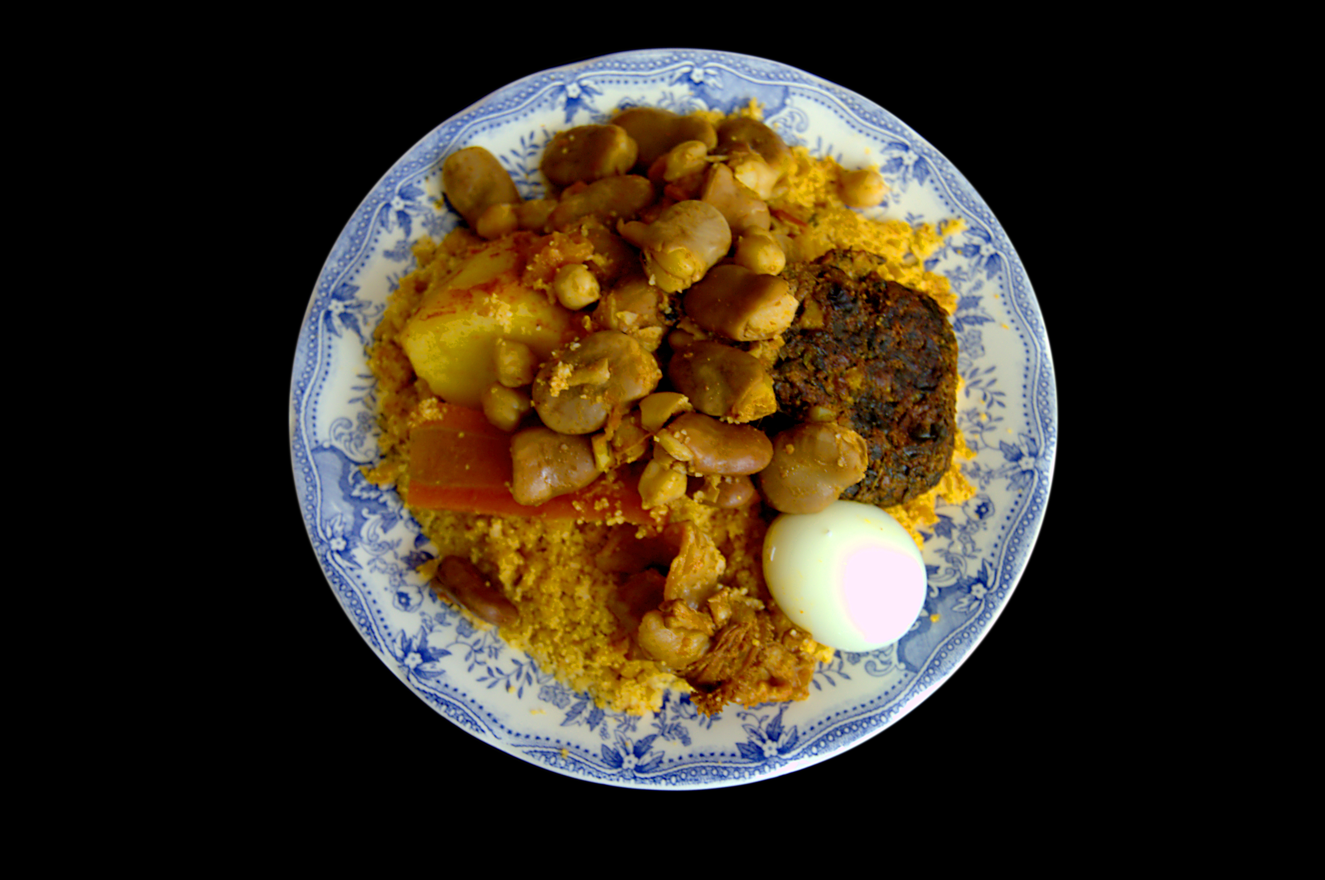 Couscous au kadid, chebtya et légumes, de Tunisie This photograph was taken with a Nikon D3100.